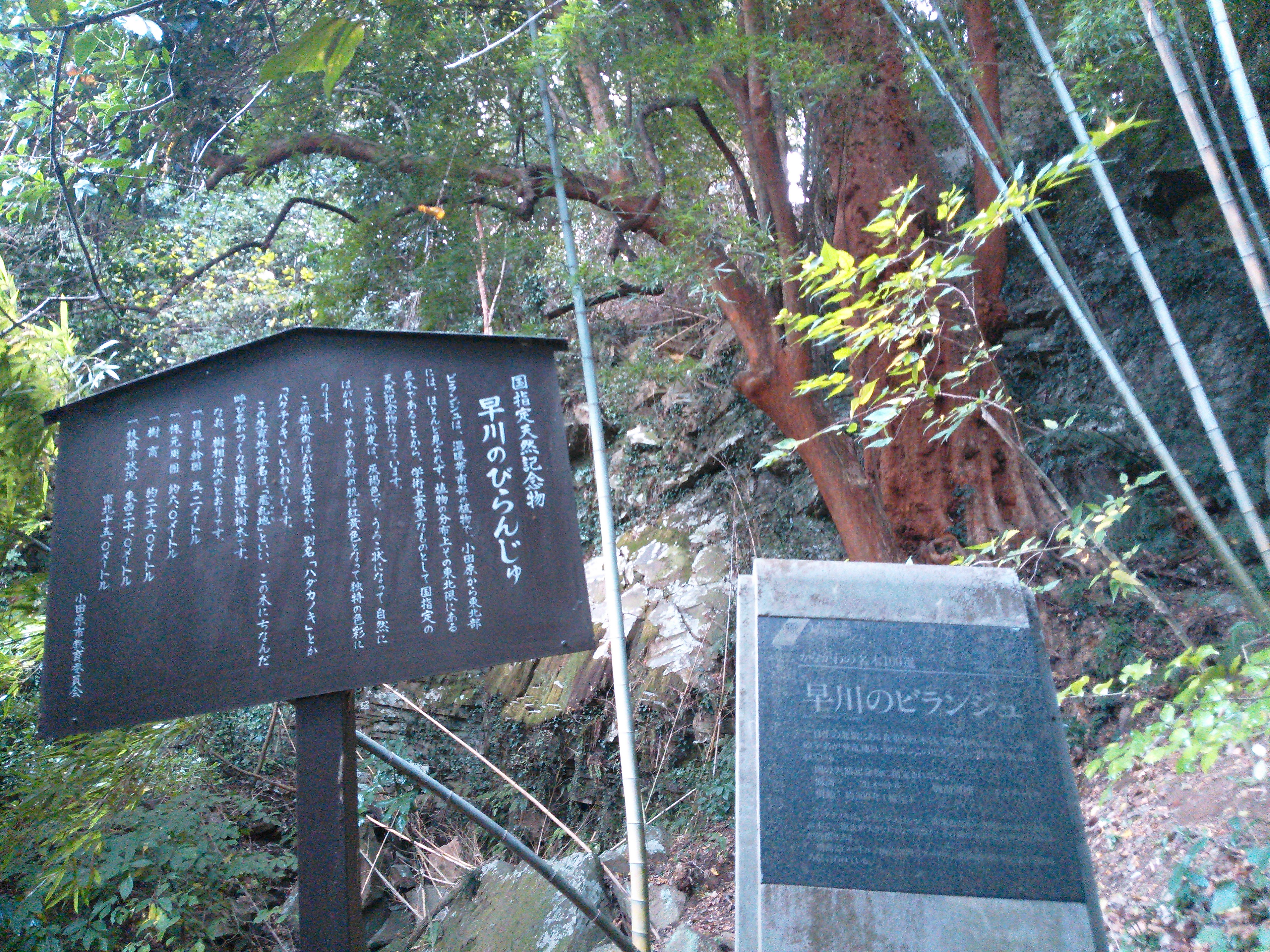 天然記念物に指定されている。日本国内の生育地では、北限に位置する。